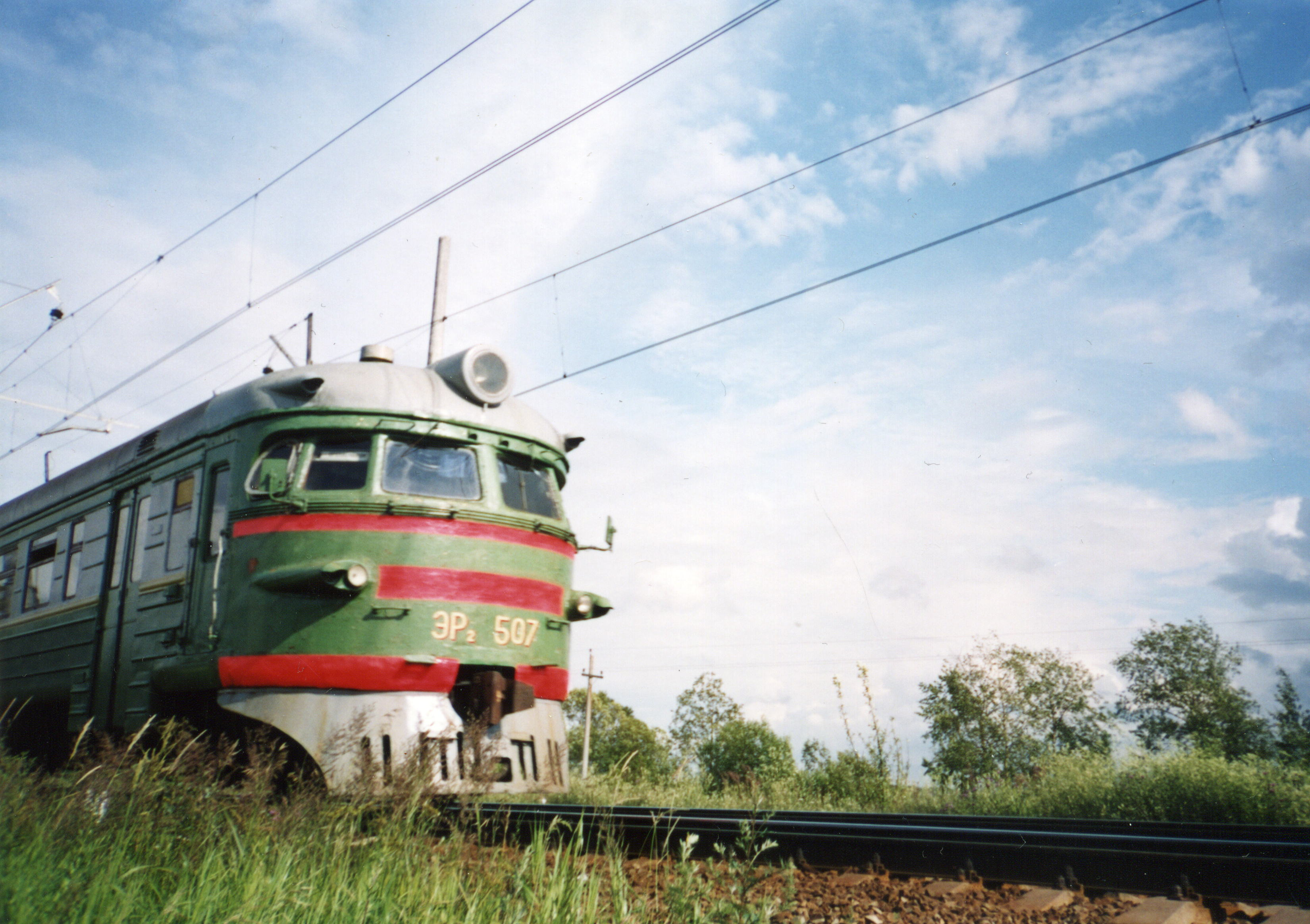 Электропоезд ЭР2-507 около платформы "Ульянка" (Санкт-Петербург)